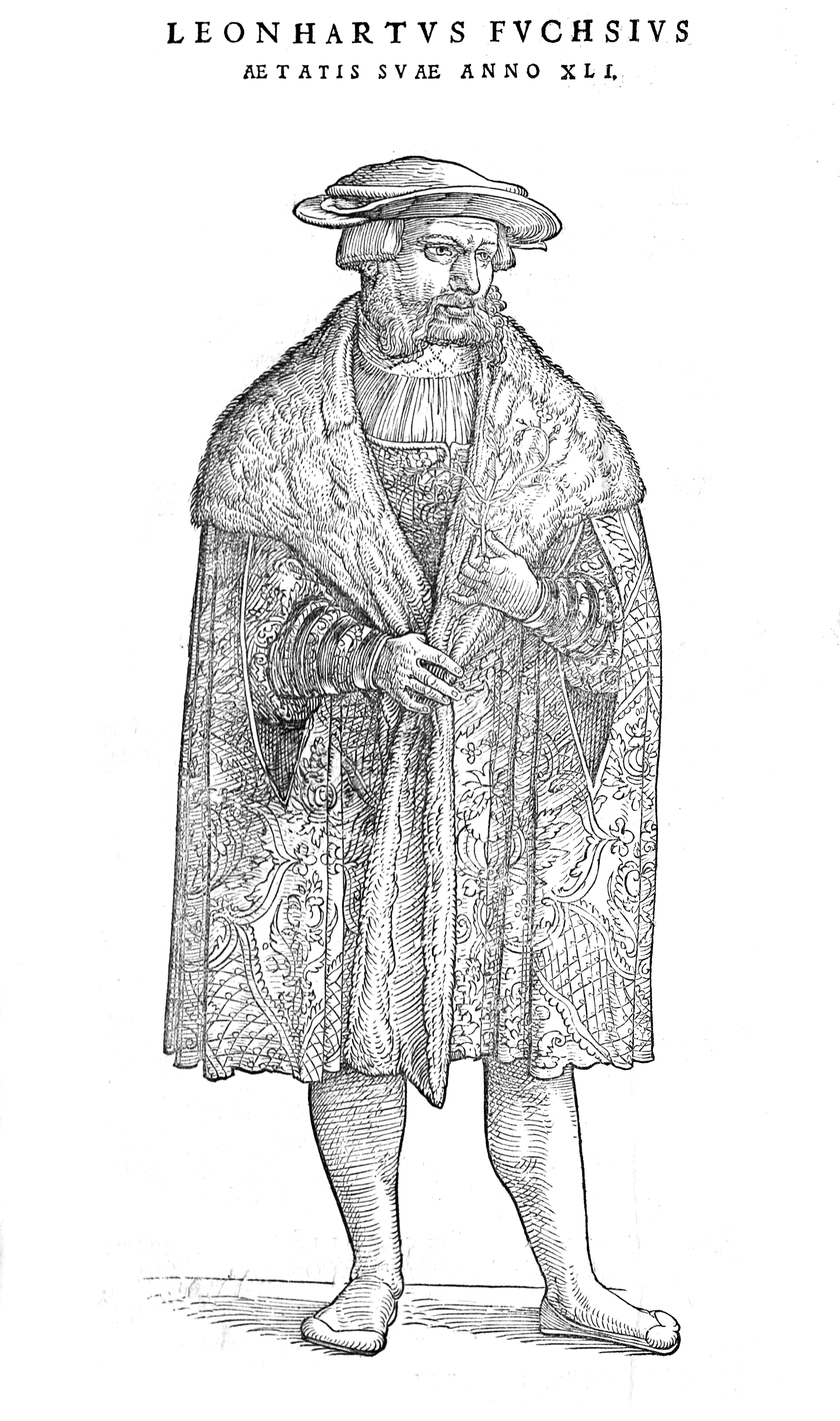 Leonard Fuchs